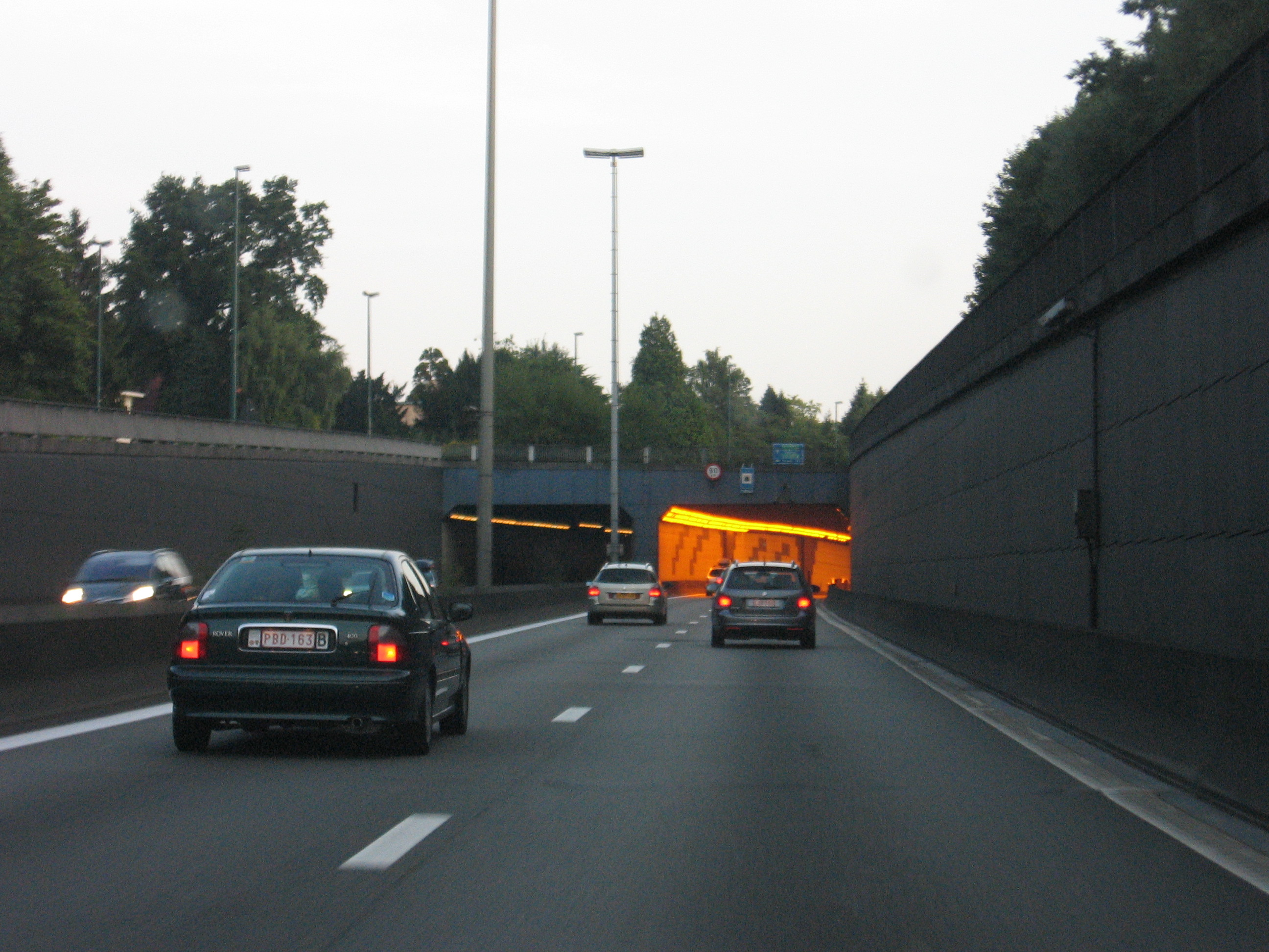 Vier Armen Tunnel (R0)